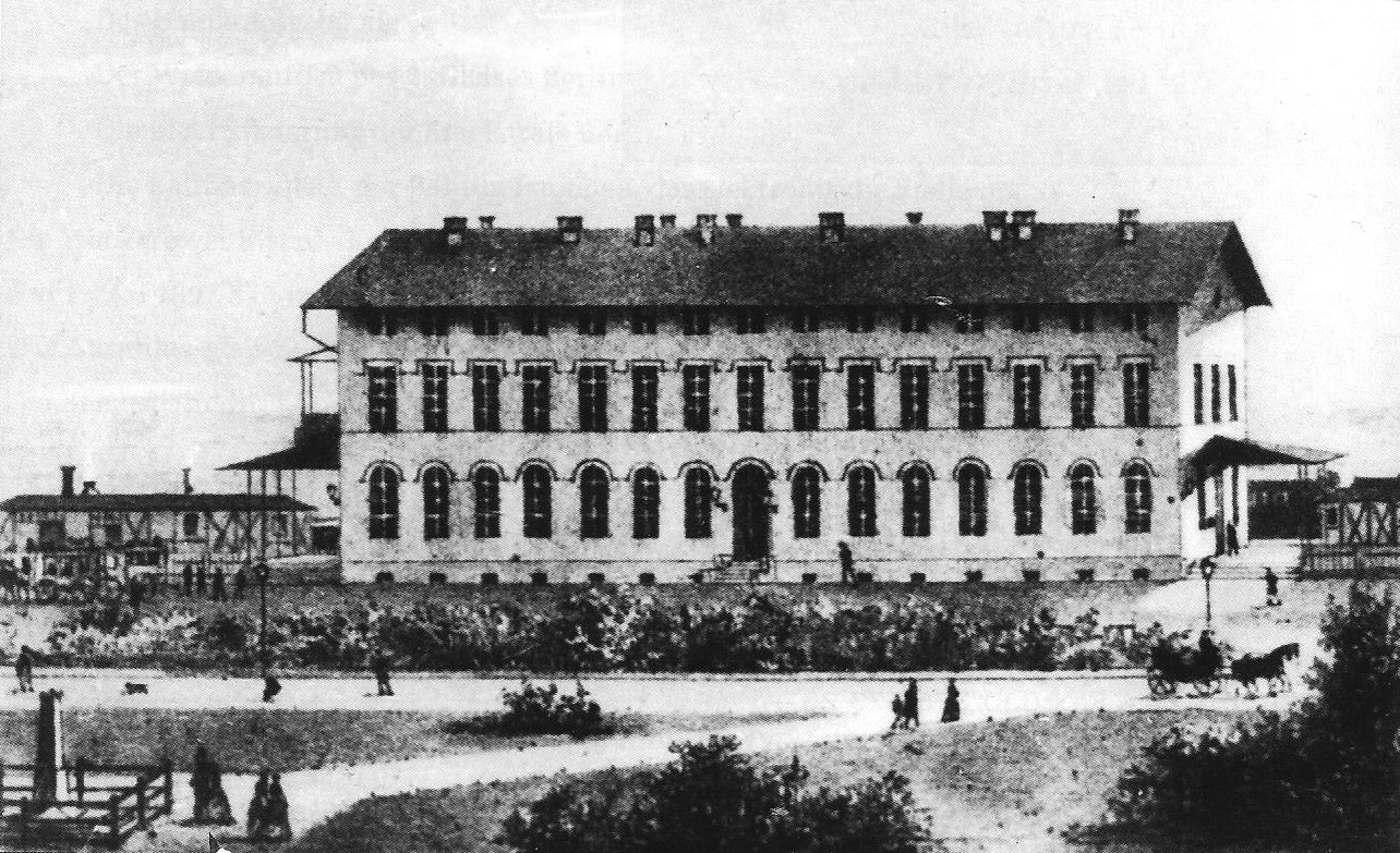 Empfangsgebäude des Greifswalder Bahnhofs.